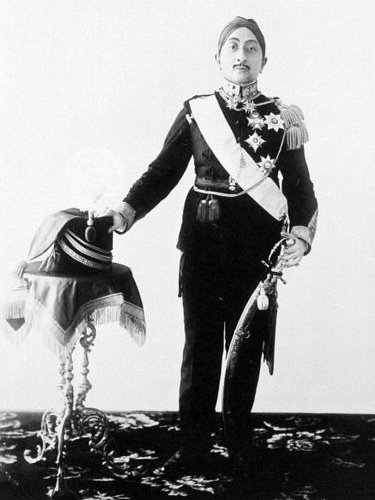 Repronegatief. Studioportret van Hamengkoe Boewono VIII, Sultan van Jogjakarta